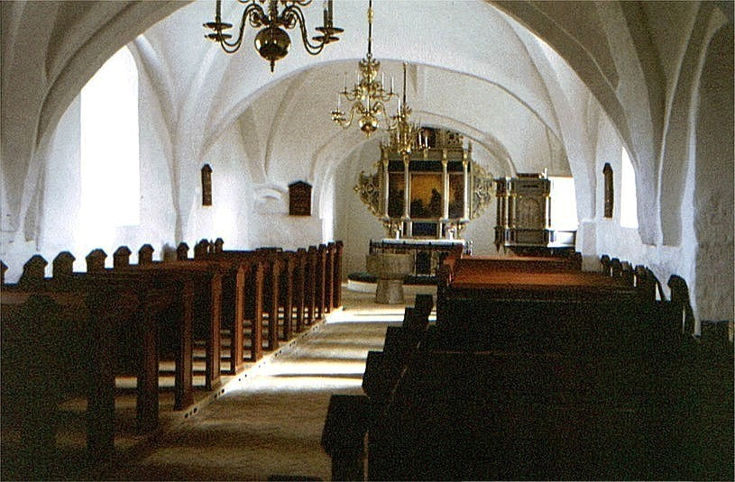 Ellinge Kirke i Danmark. Skib set mod øst